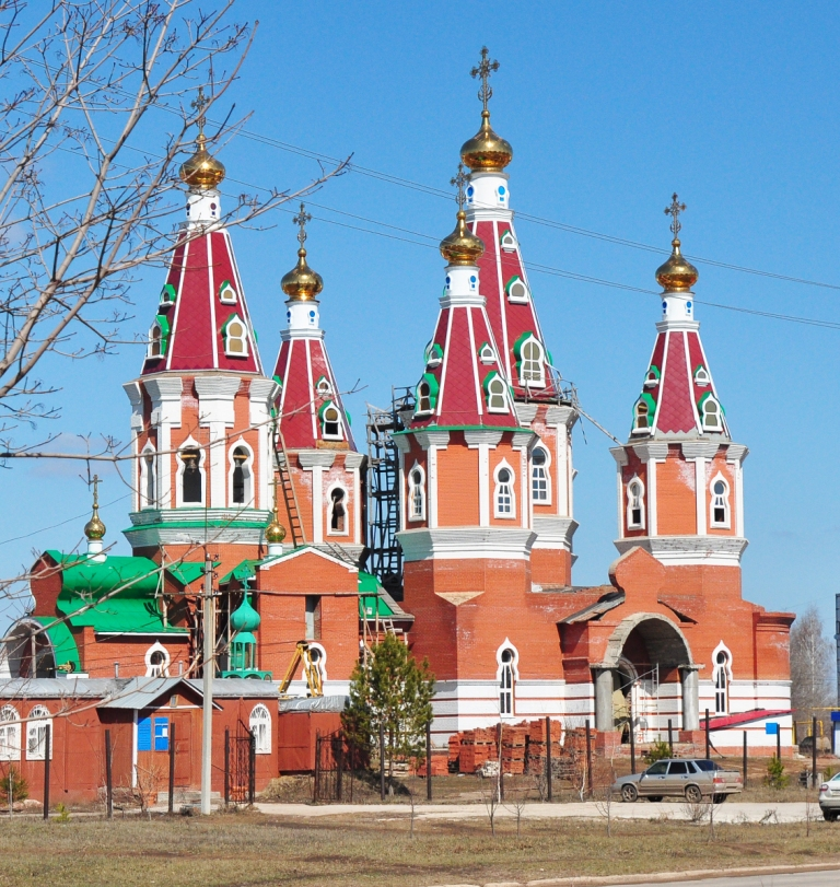 Православный храм в Отрадном